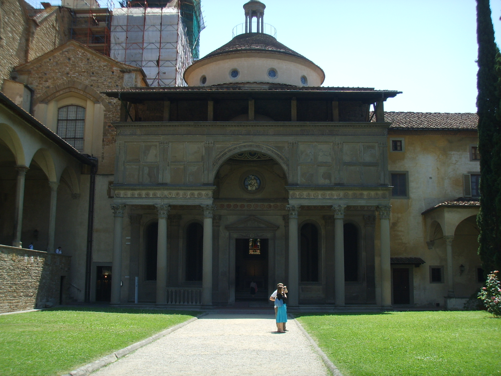 Santa Croce church, cappella dei Pazzi outside view, in Florence, Italy